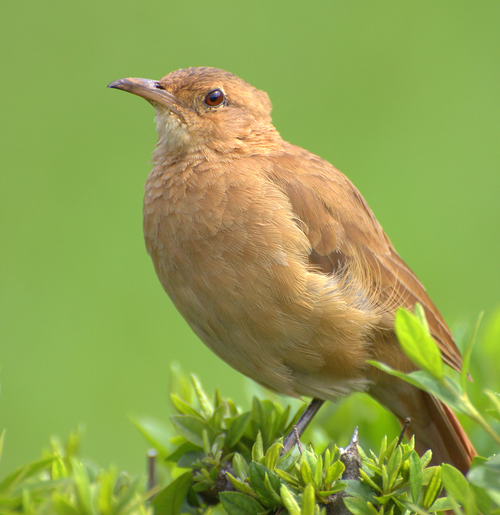 Parque da Independência, Museu do Ipiranga, São Paulo